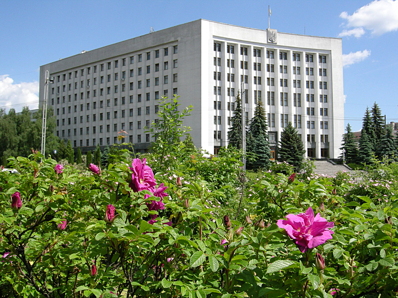 Будинок Тернопільської обласної ради, Тернопільської державної адміністрації.